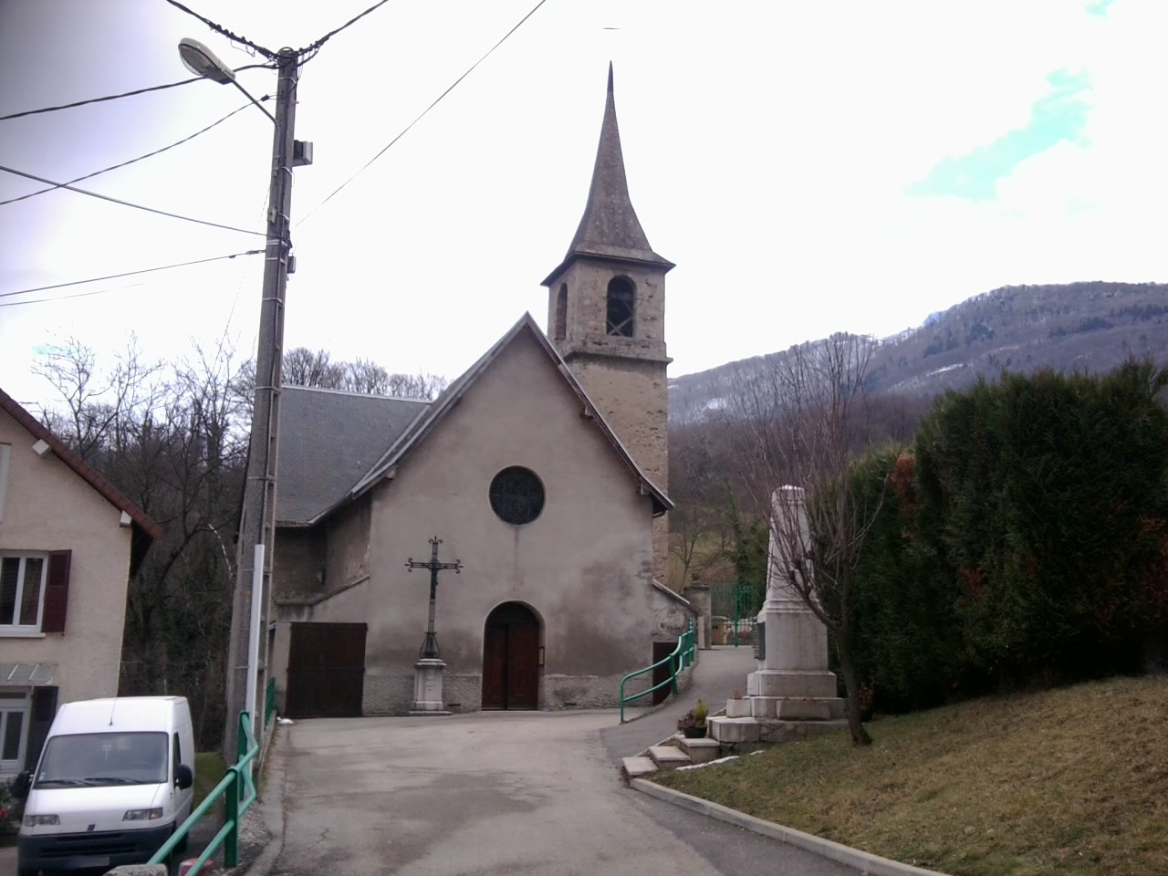 Saint-Pierre-de-Mésage (38) : L'église Sainte-Marie.